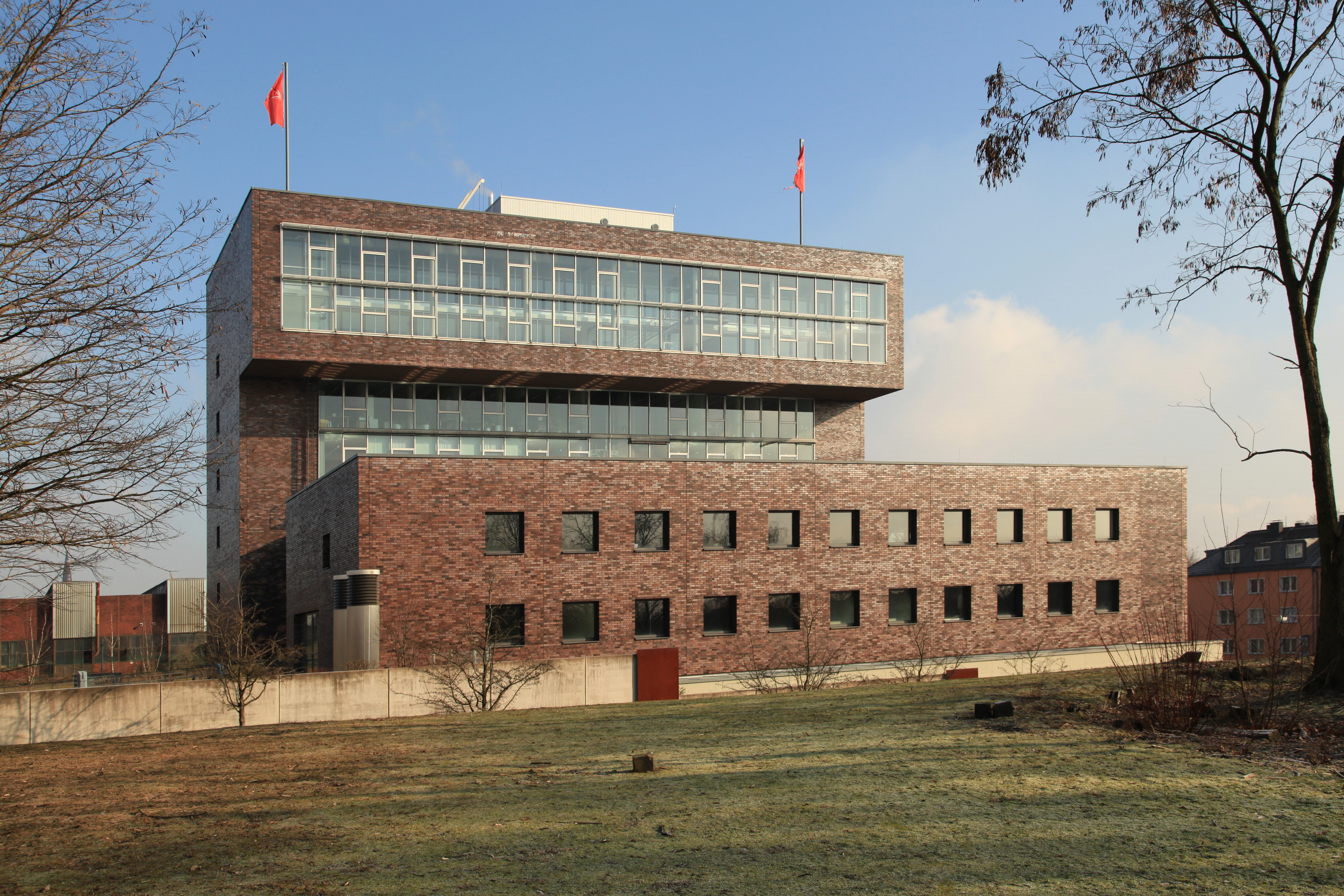 Jahrhunderthaus, Alleestraße 80 in Bochum